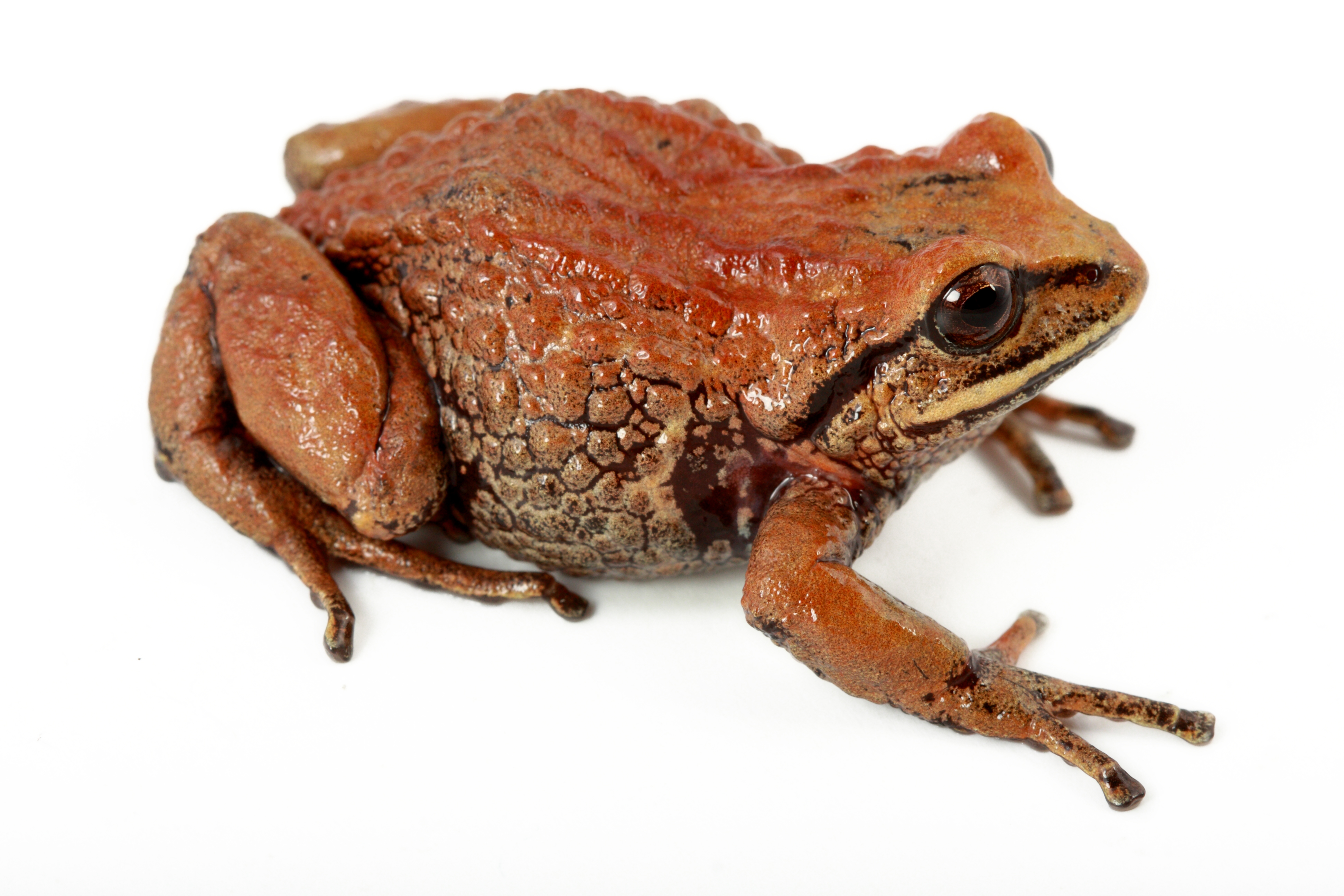 Pristimantis curtipes. Laguna de San Marcos, Provincia Pichincha, Ecuador. Foto de Santiago R. Ron-FaunaWebEcuador [ .ec/Vertebrados/anfibios/ web]